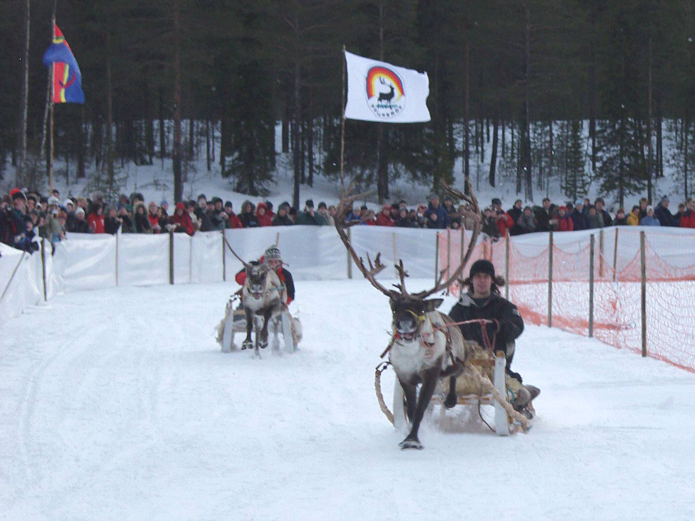 Rentierschlittenrennen auf dem Talvatis-See beim Jokkmokksmarkt 2005